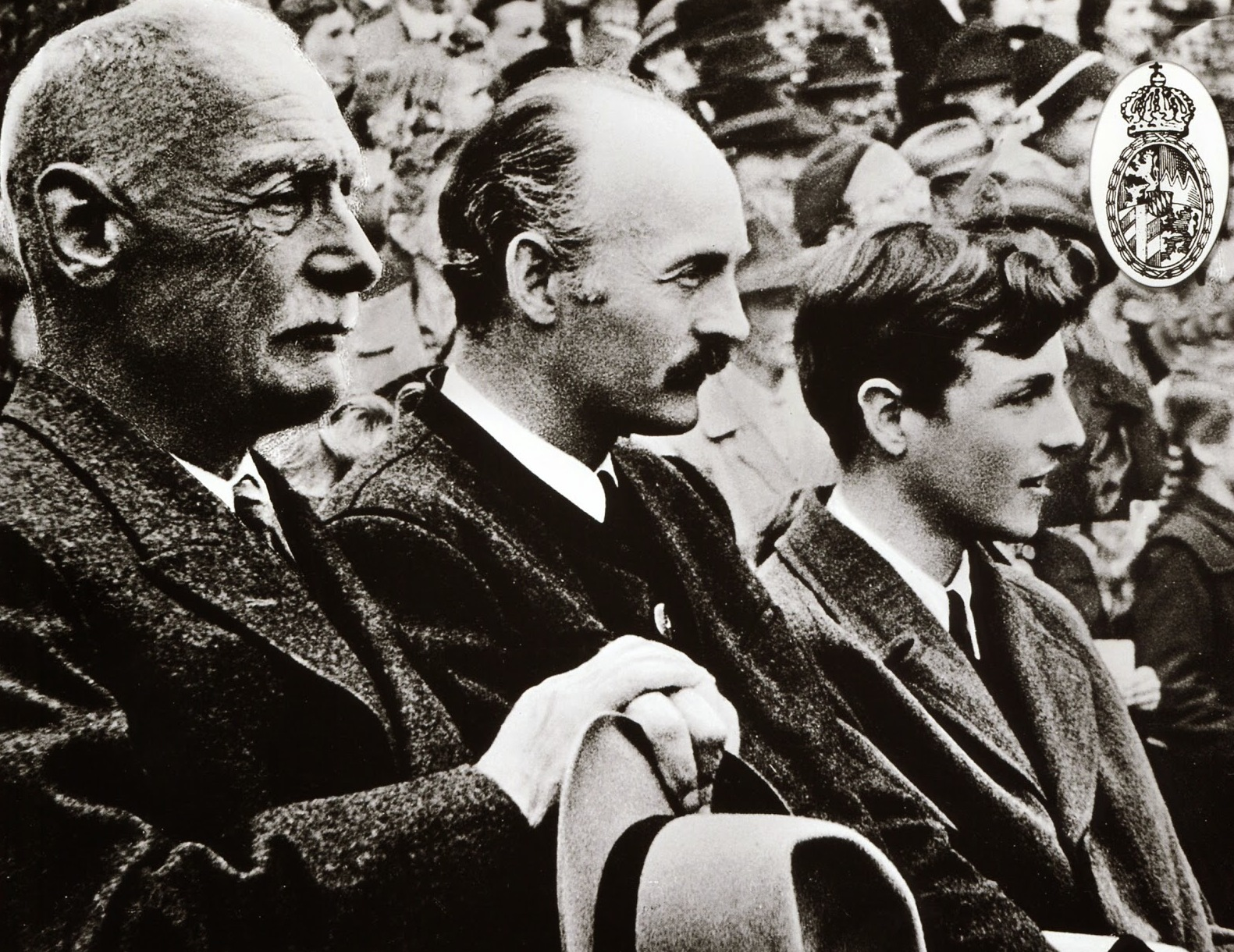 3 Generationen Bayerisches Königshaus: Kronprinz Rupprecht, Herzog Albrecht mit Herzog Franz